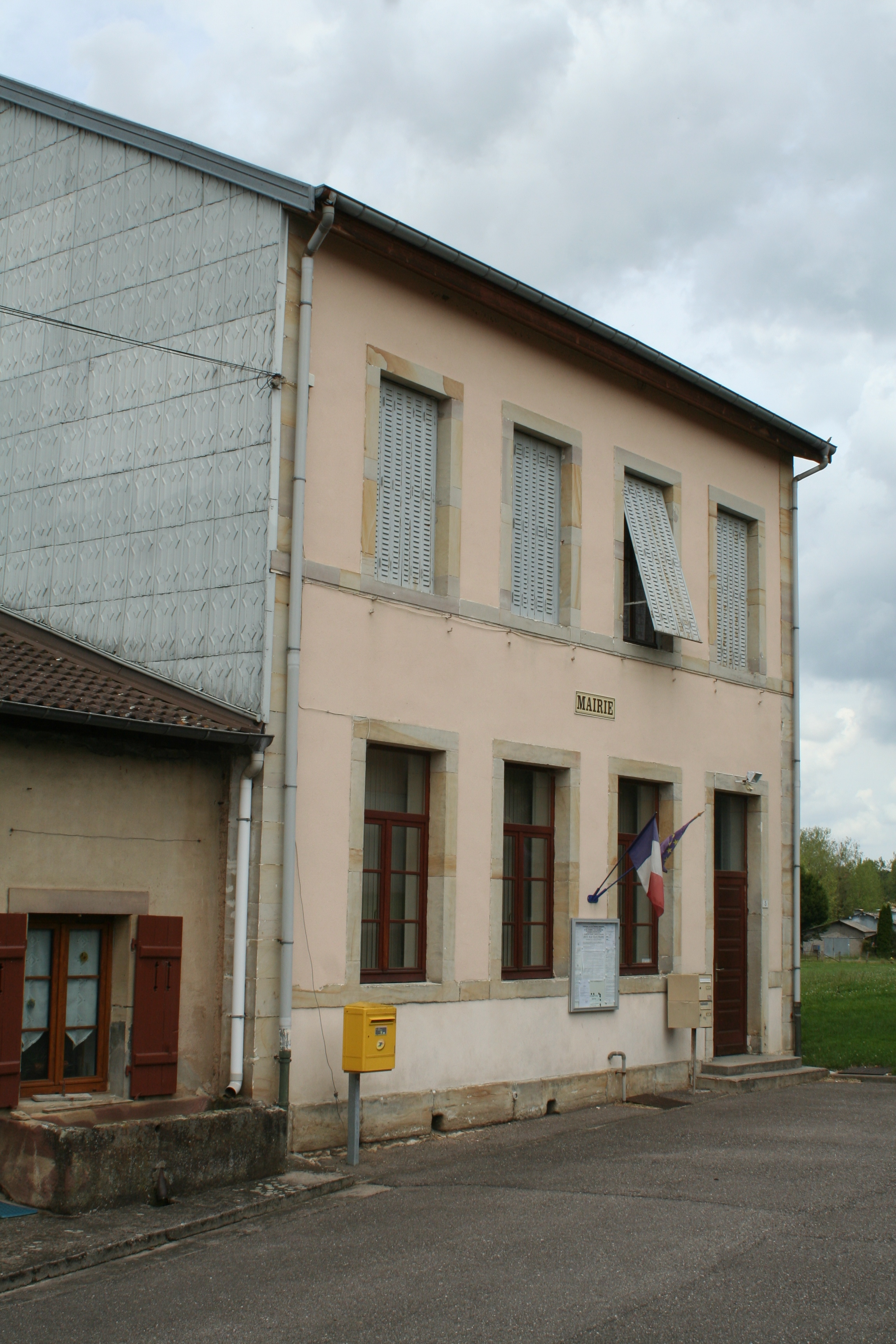 Mairie de Deinvillers (Vosges)